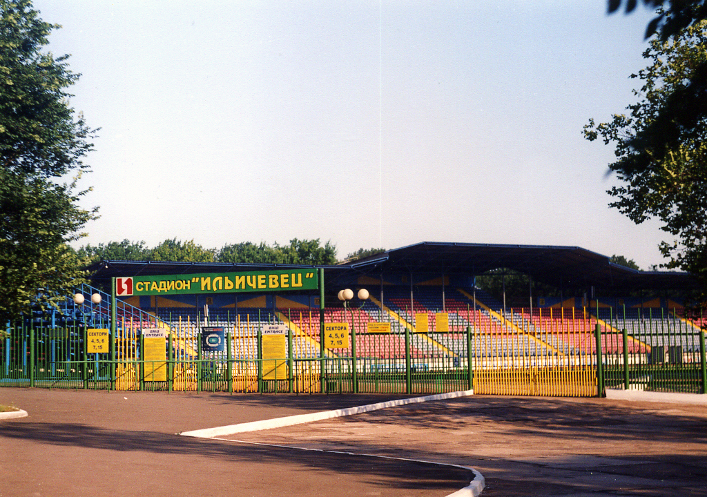 Стадіон «Іллічівець», Маріуполь